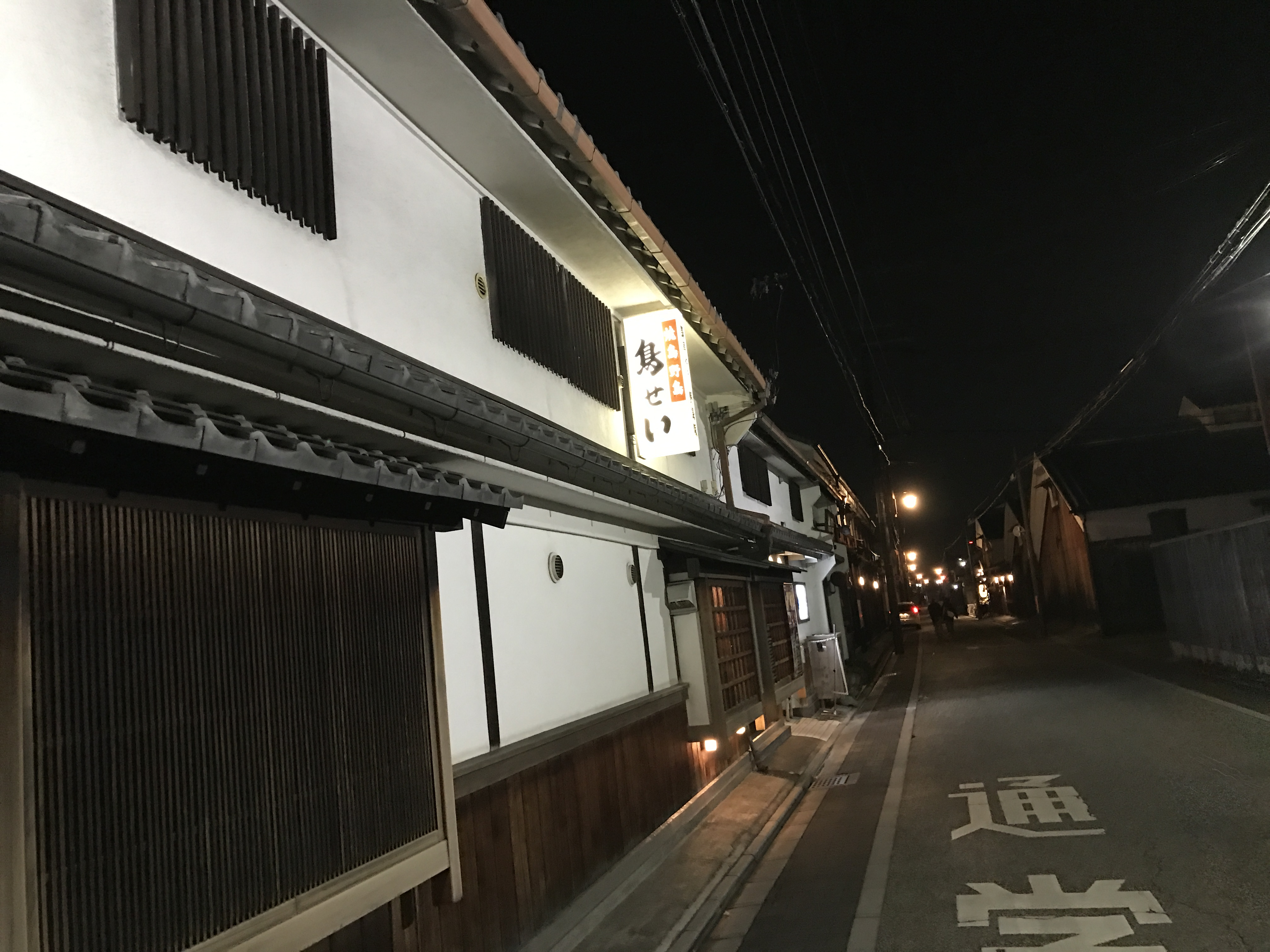 鳥せい本店店舗写真